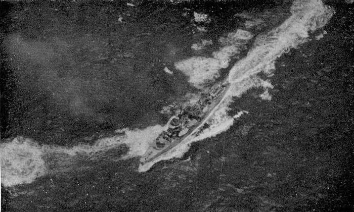 日本海軍第二号型海防艦 『第四号海防艦』または『第十二号海防艦』、父島沖